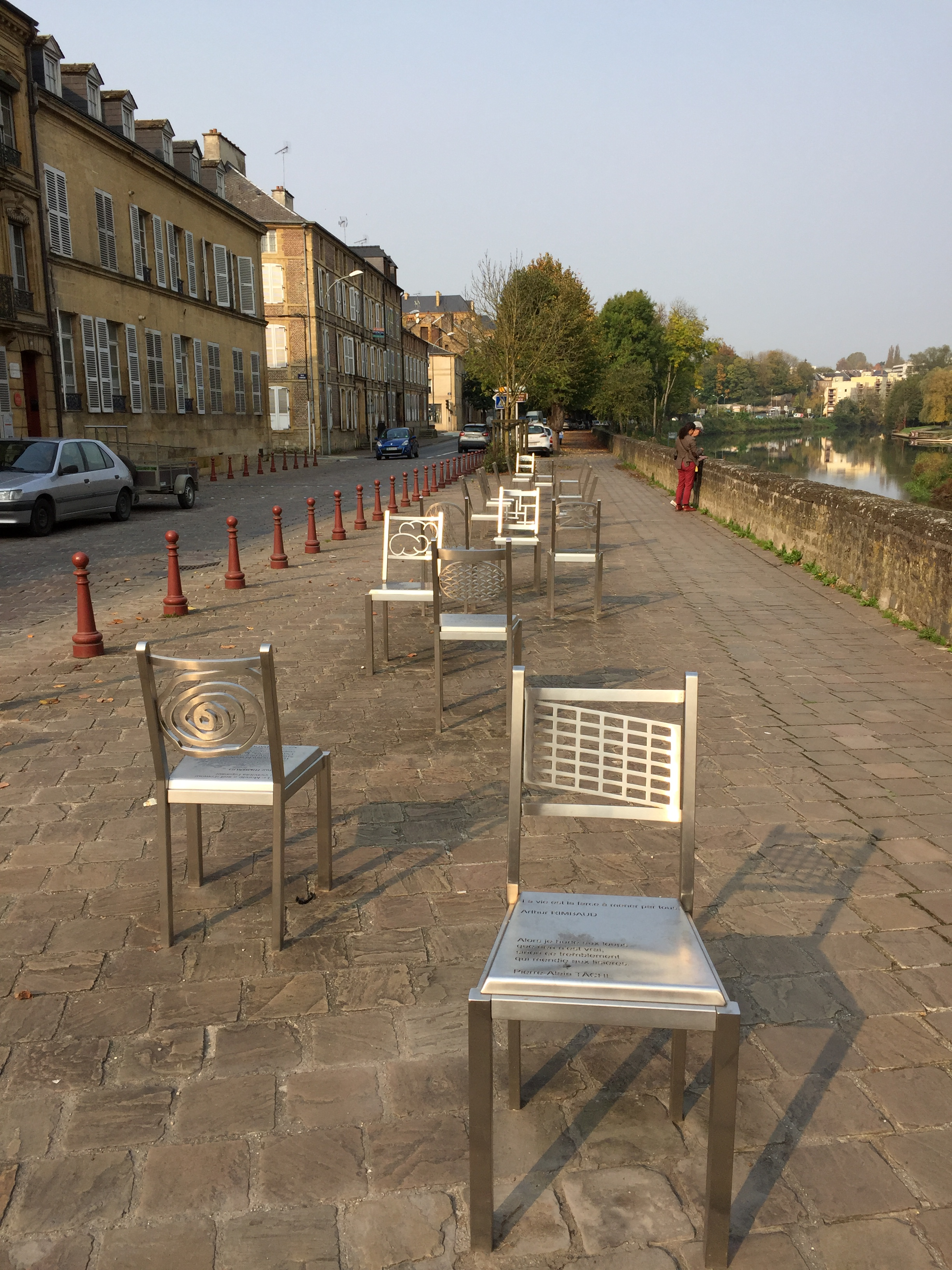 Oeuvre de Michel Goulet